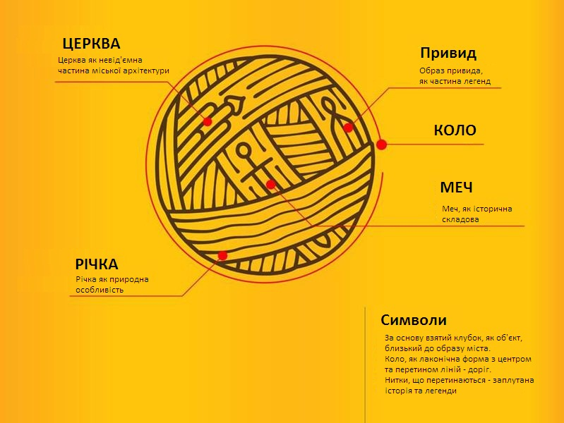 Де- факто девізом Чернігова сьогодні є гасло "Чернігів - місто легенд " , він відображений на туристичному логотипі , розробленому в 2010р. Процес розробки візуальної складової туристичного позиціонування Чернігова розпочався з визначення відмінних рис міста , його унікальностей : старовинні церкви і собори періоду , коли Чернігів був стольним градом могутнього князівства , гармати на Валу , Десна , і головне - легенди , фактично в кожному куточку міста своя легенда . Після тривалого широкого обговорення досить привабливих проектів зупинилися на логотипі у вигляді клубка ( переплетення подій минулого ) , між нитками якого проступають храм , меч , річка і чернець - привид .